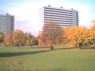 Langenæshus